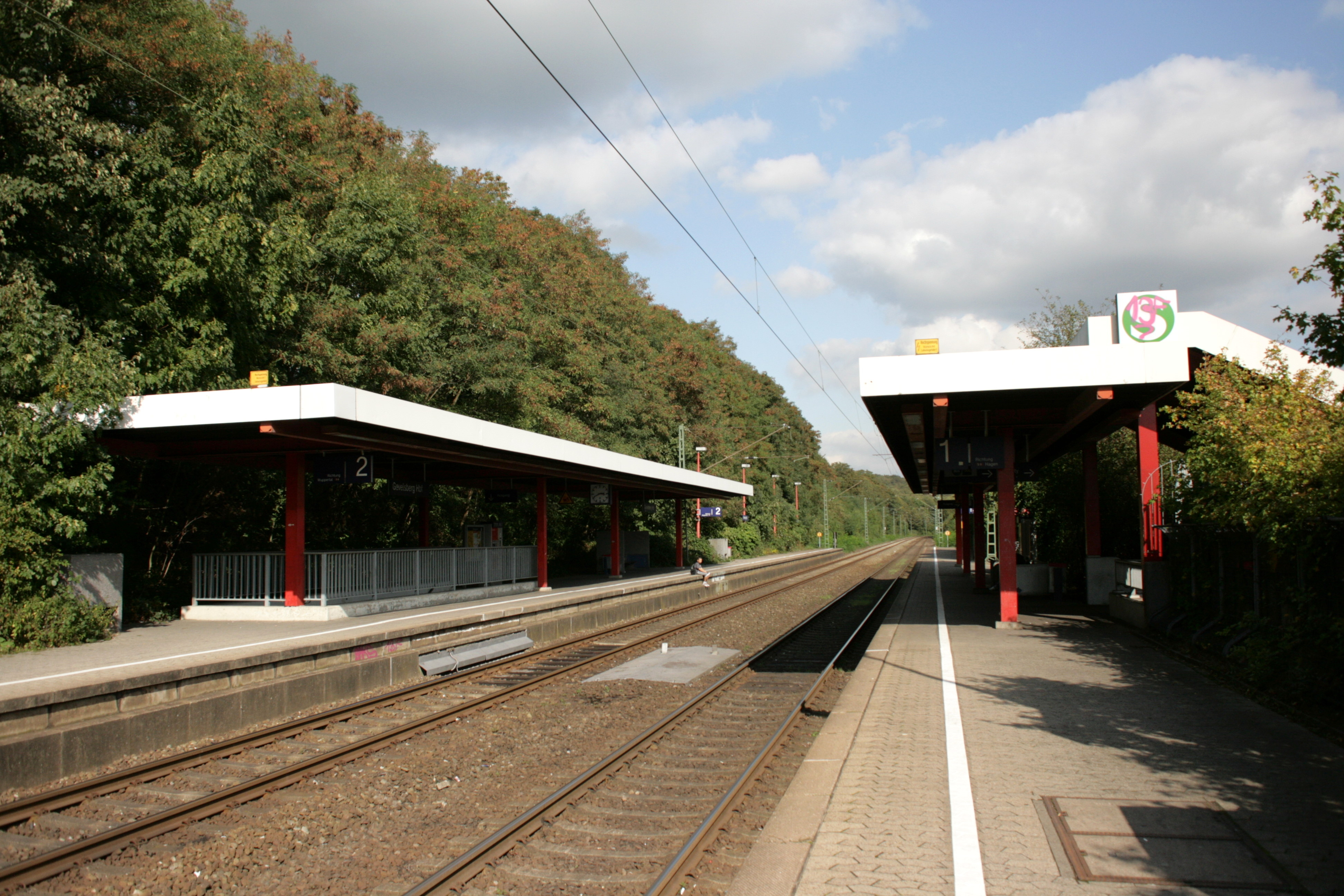 Hauptbahnhof, Rheinische Straße in Gevelsberg